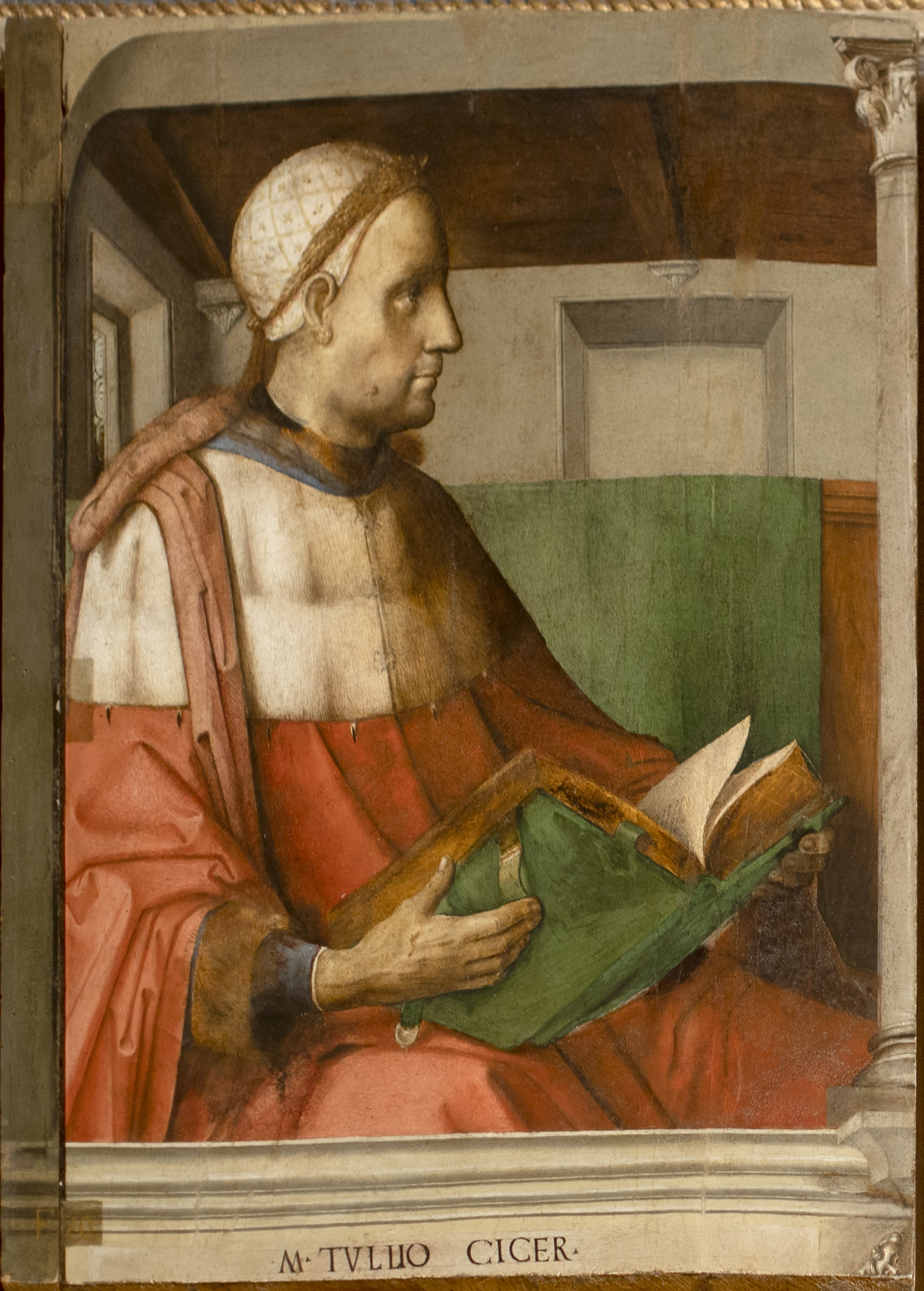 M Tullio Cicer (Cicerone) - Studiolo di Federico da Montefeltro